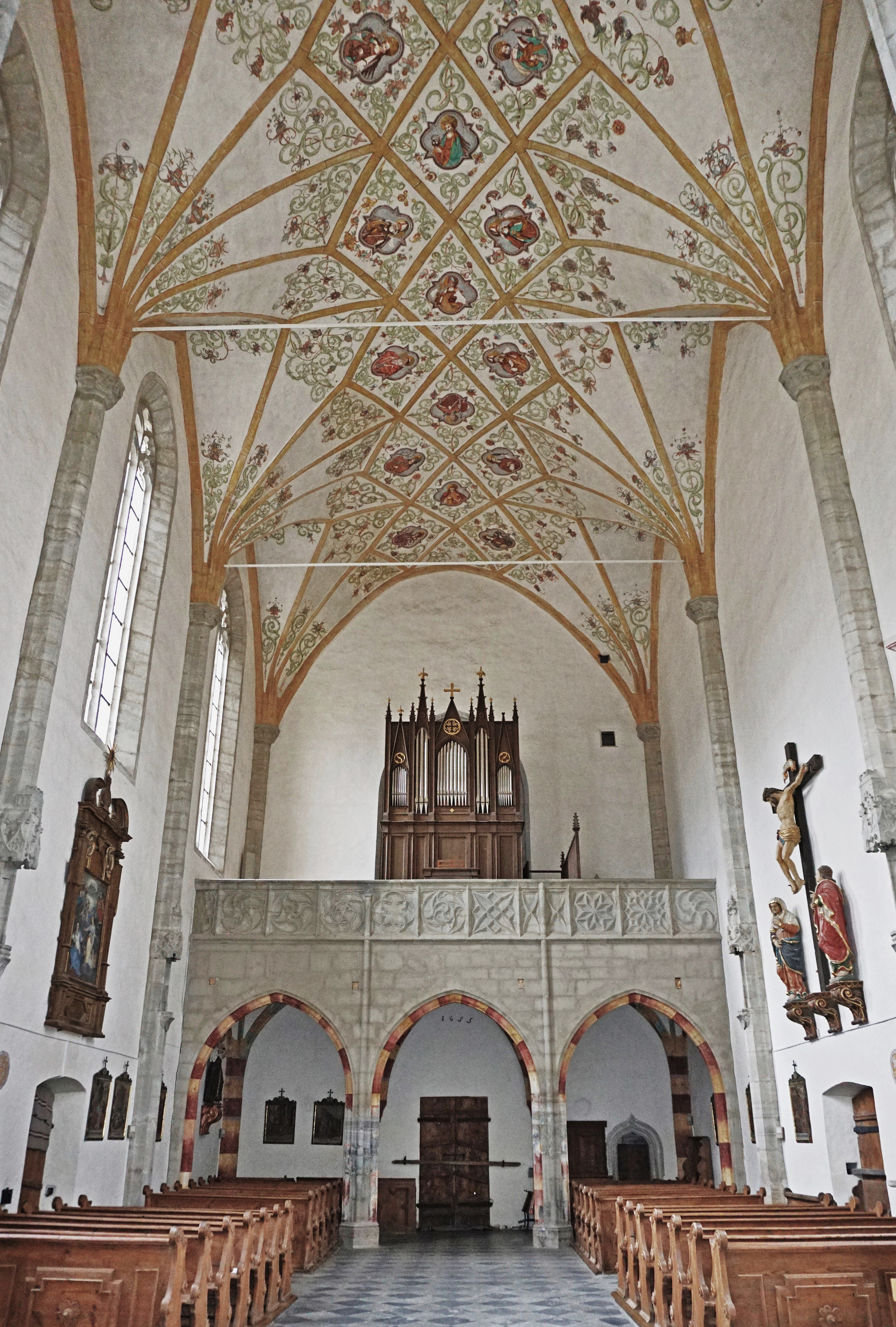 Kath. Filialkirche St. Wolfgang ob Grades, Innenansicht gegen die Orgelempore